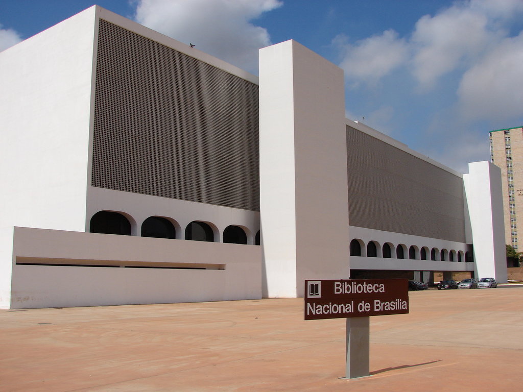 Biblioteca Nacional de Brasília, Brasil.